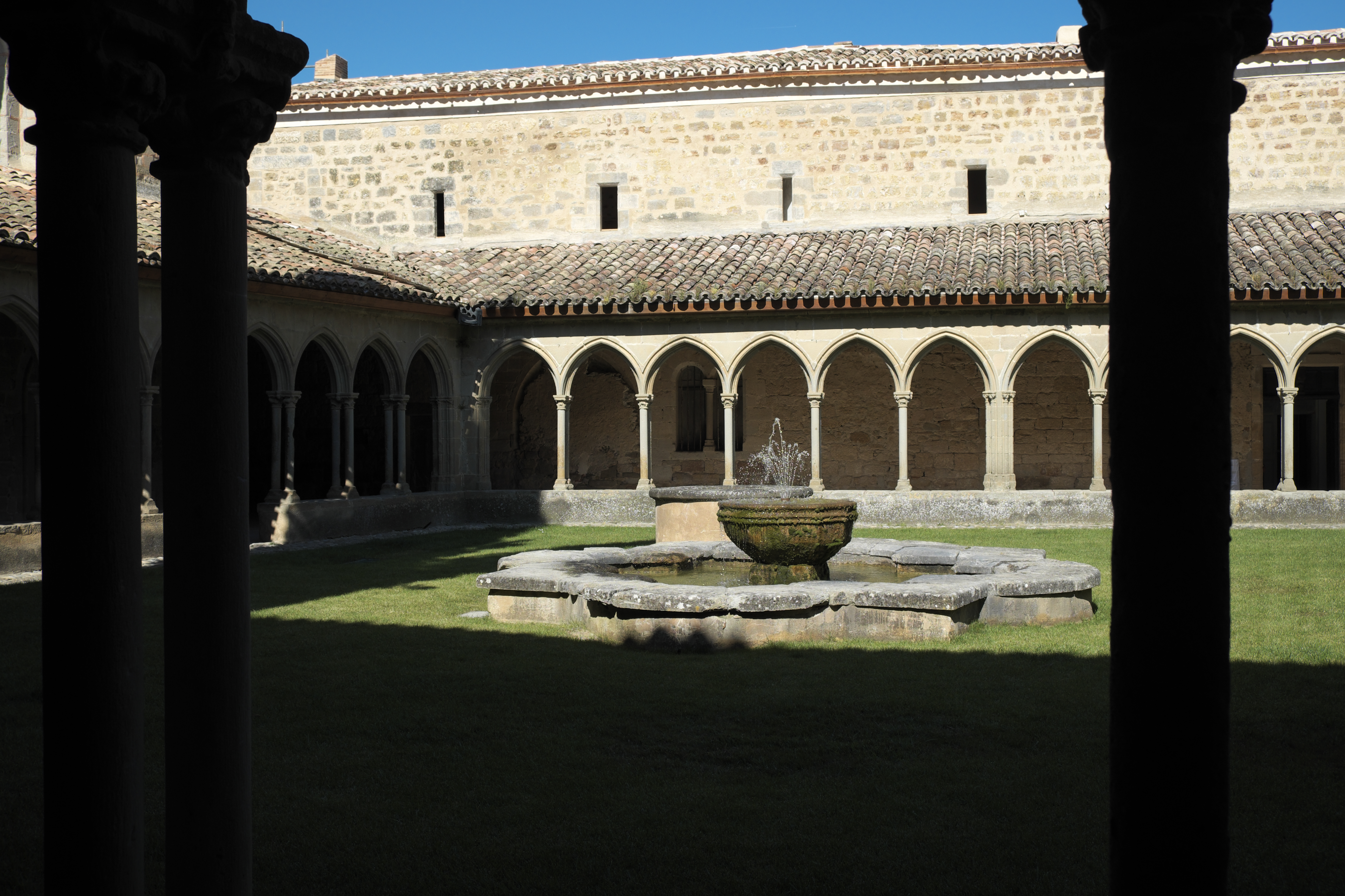 Ehemalige Abtei Saint-Hilaire in Saint-Hilaire im Département Aude (Region Languedoc-Roussillon/Frankreich), Kreuzgang